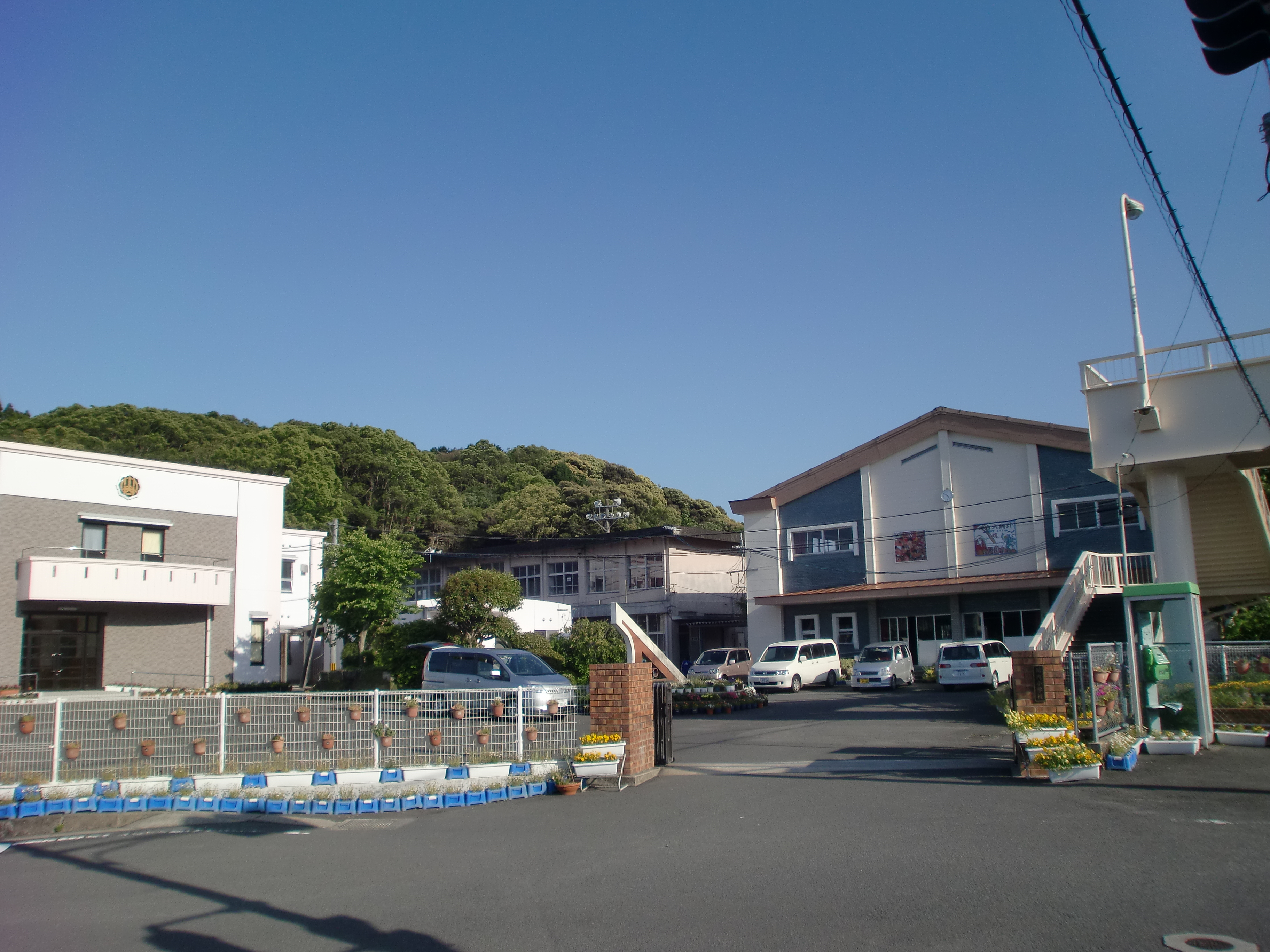 薩摩川内市立川内小学校の外観。